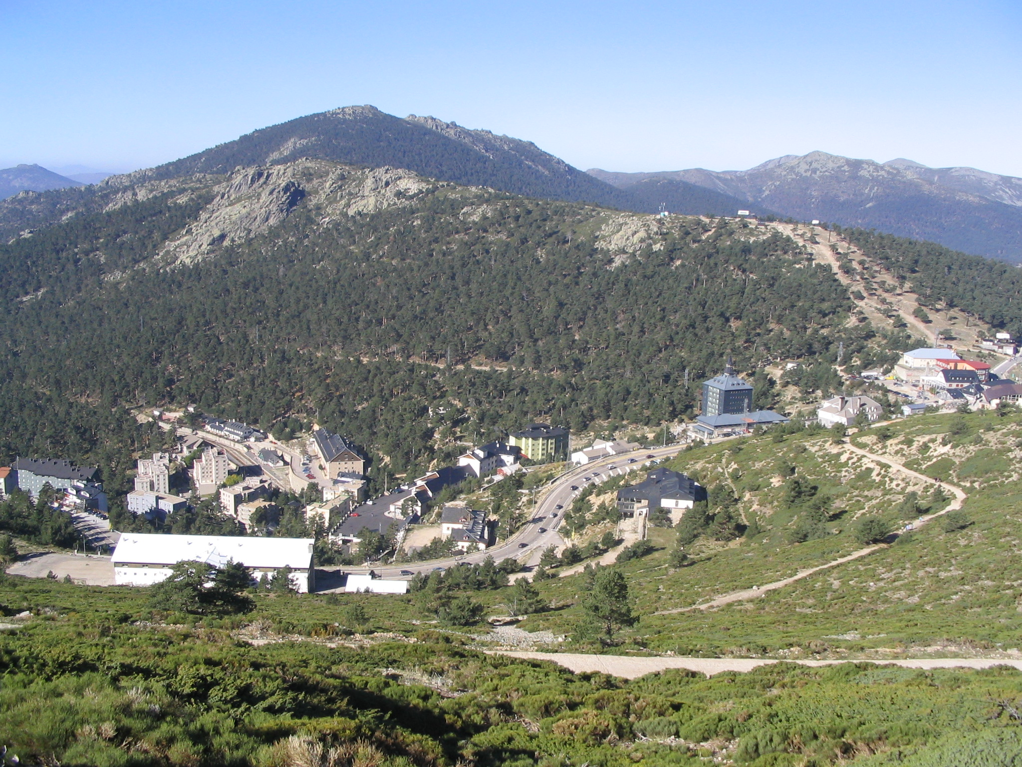 Vista del Puerto de Navacerrada desde las inmediaciones de la cima de la Bola del Mundo (2.268 m). Este puerto de montaña tiene una altura de 1.880 metros, siendo el más alto de la Sierra de Guadarrama, y comunica las provincias españolas de Madrid y Segovia. Pero su importancia reside en que es una estación de esquí muy concurrida y por ser un animado centro de montañismo y turismo al tener una estación de ferrocarril, albergues, hoteles y restaurantes. Todas estas instalaciones están en la vertiente madrileña del puerto, que es la que se ve en la fotografía. Así mismo, desde este paso de montaña salen algunas rutas y ascensiones muy populares en la sierra. En la imagen se ve, tras el Puerto de Navacerrada, la cara norte de Siete Picos (2.138 m) y a la derecha la sierra de la Mujer Muerta.